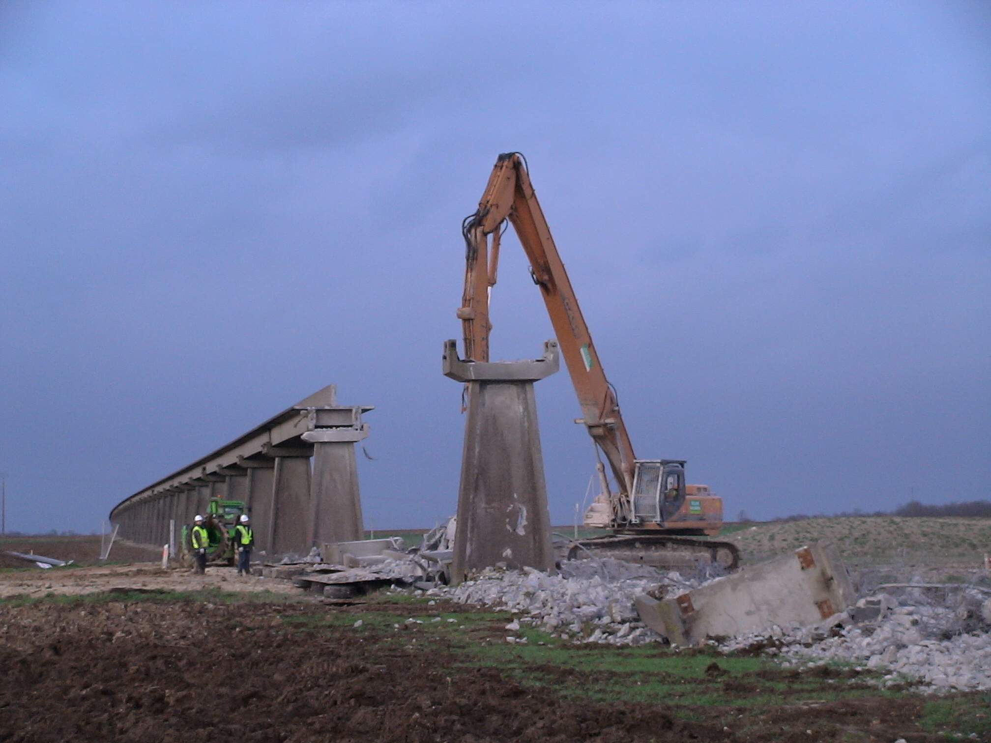 Destruction de 120 mètres de voie en vue du passage de la nouvelle autoroute A19 au niveau de la commune de Chevilly dans le département français du Loiret.